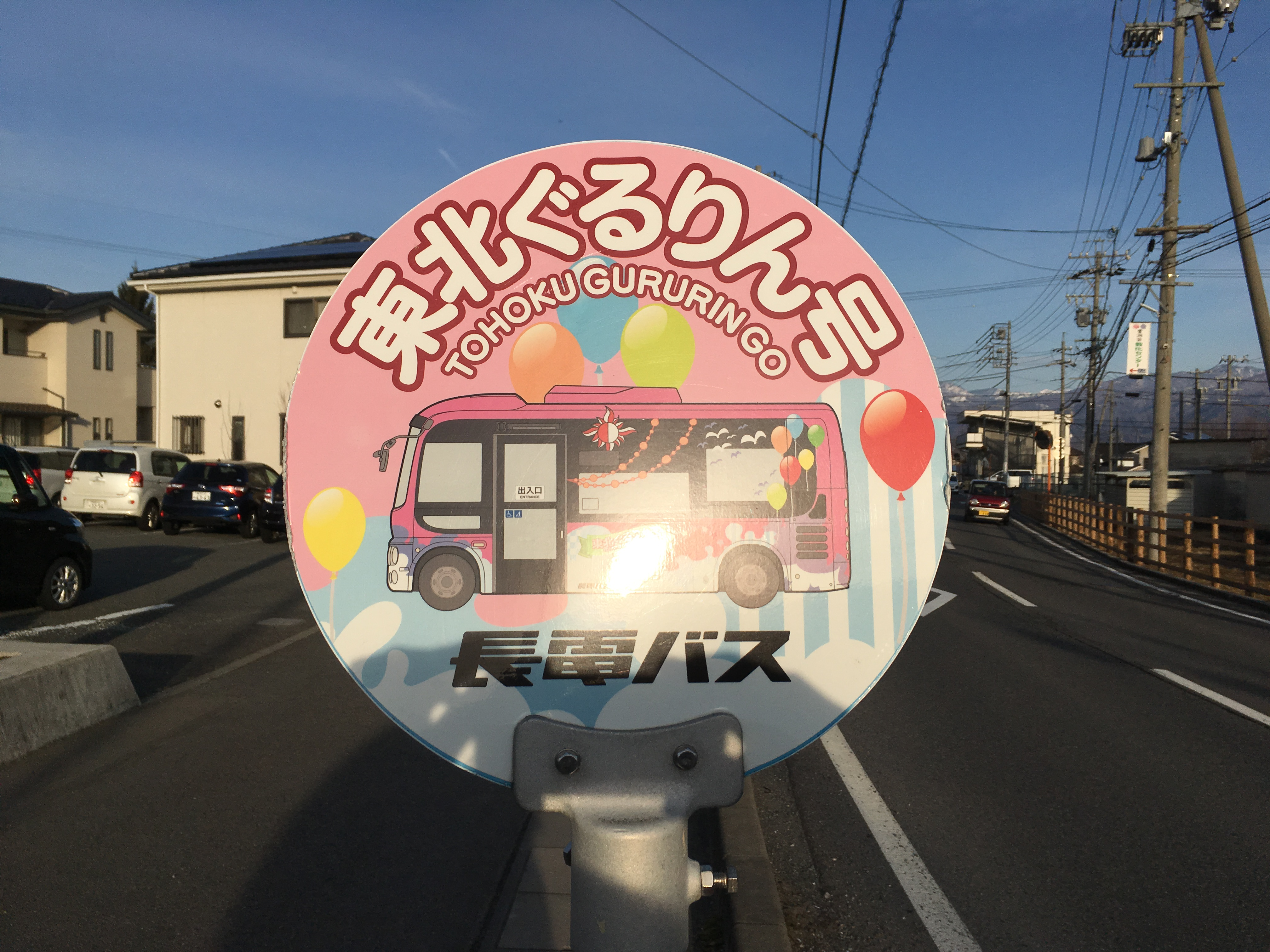 東北ぐるりん号のバスが描かれたバス停